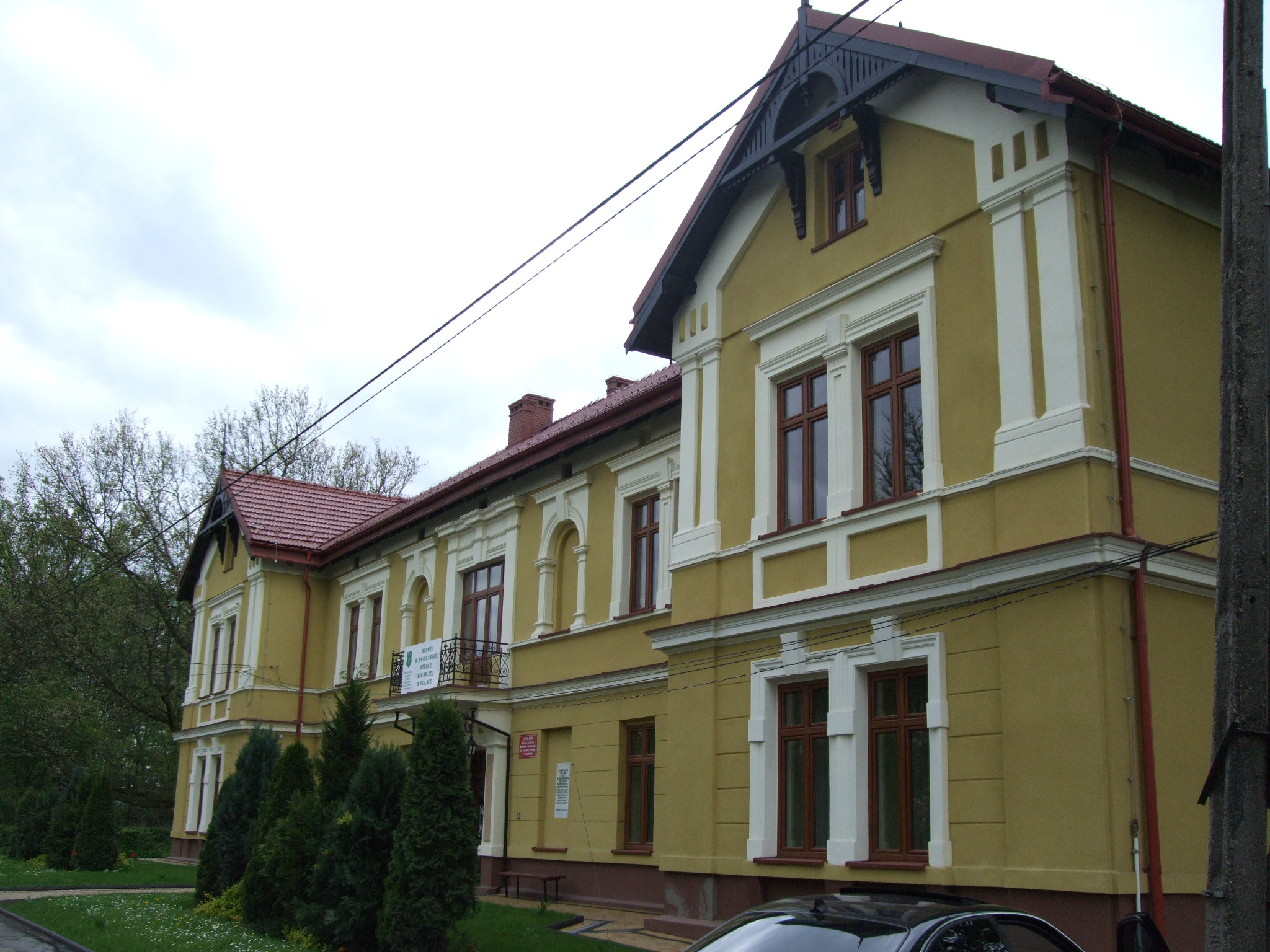 Najstarsza szkoła rolnicza w Polsce Rolnicze Centrum Kształcenia Ustawicznego im.Franciszka Stefczyka w Czernichowie.